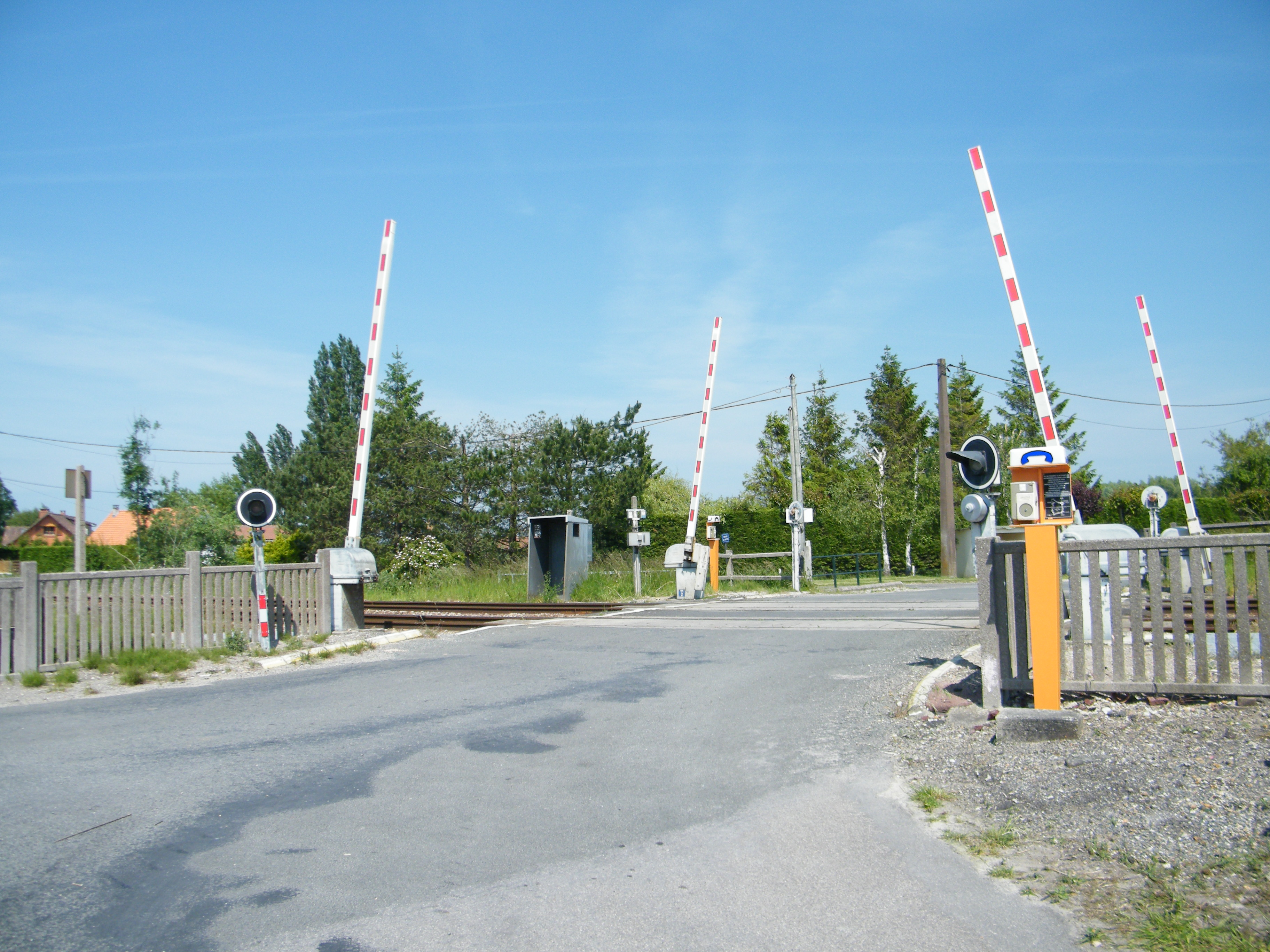 Le passage à niveau près de la gare.